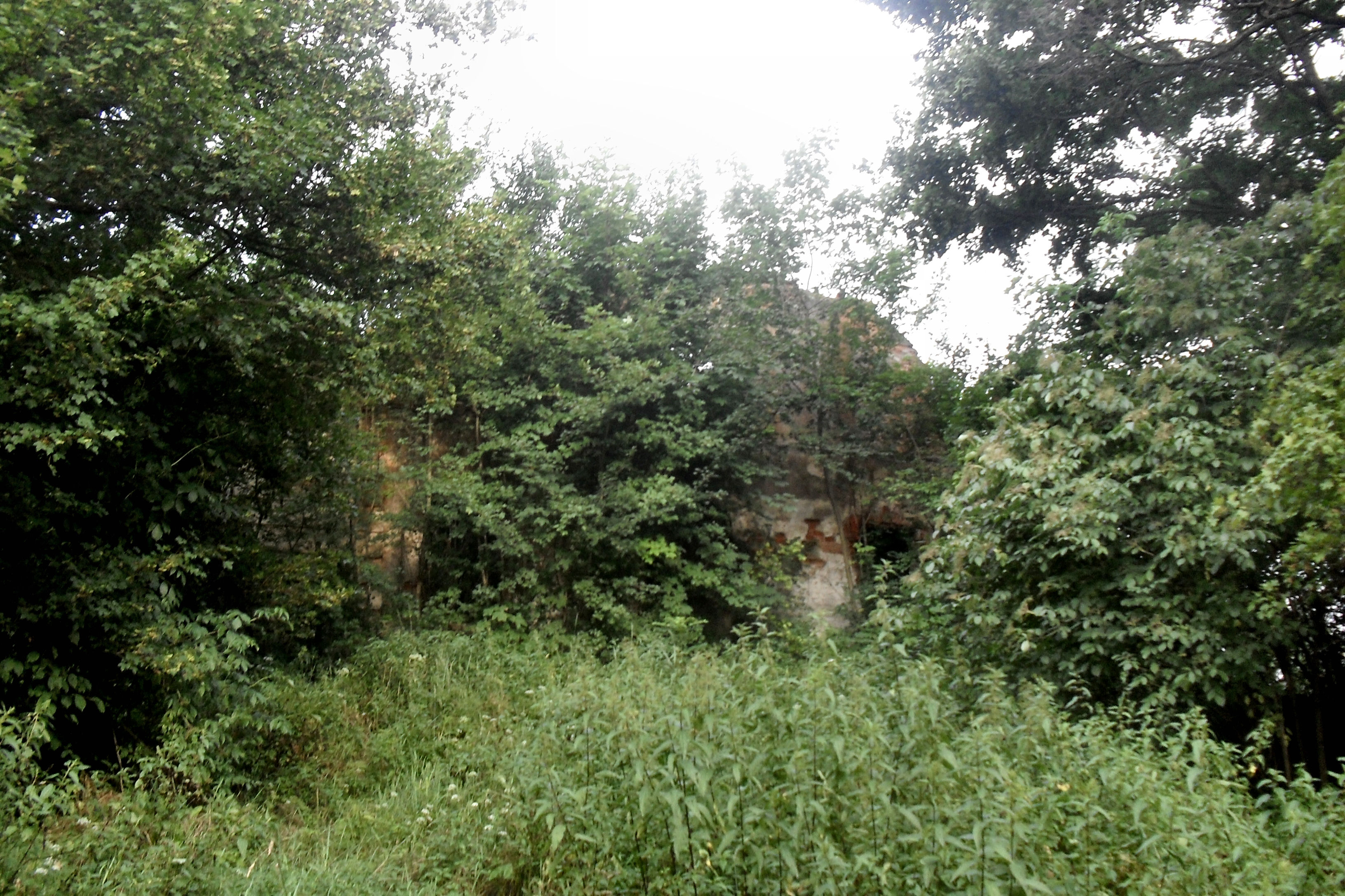 Dwór w Bieździadce - ruiny